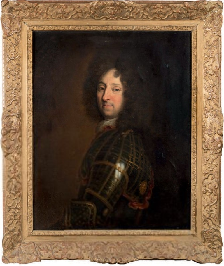 Portrait de Dumont, vers 1700-1720.